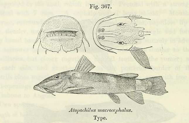 Atopochilus macrocephalus